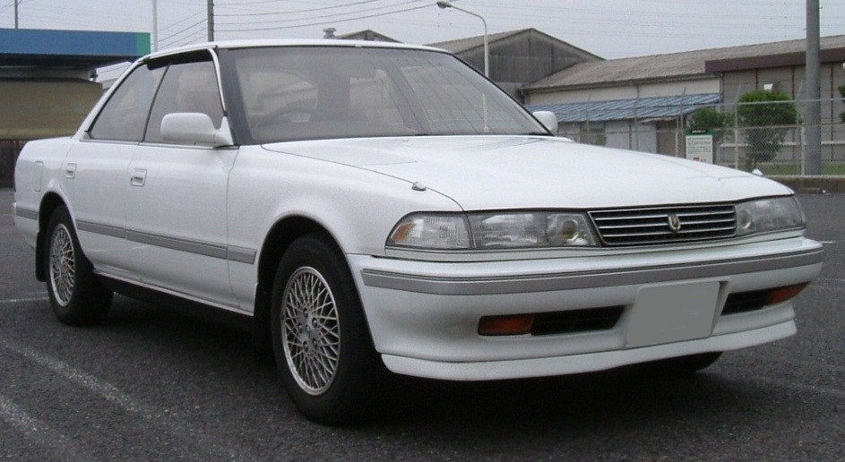 ハードトップ2000 グランデリミテッド